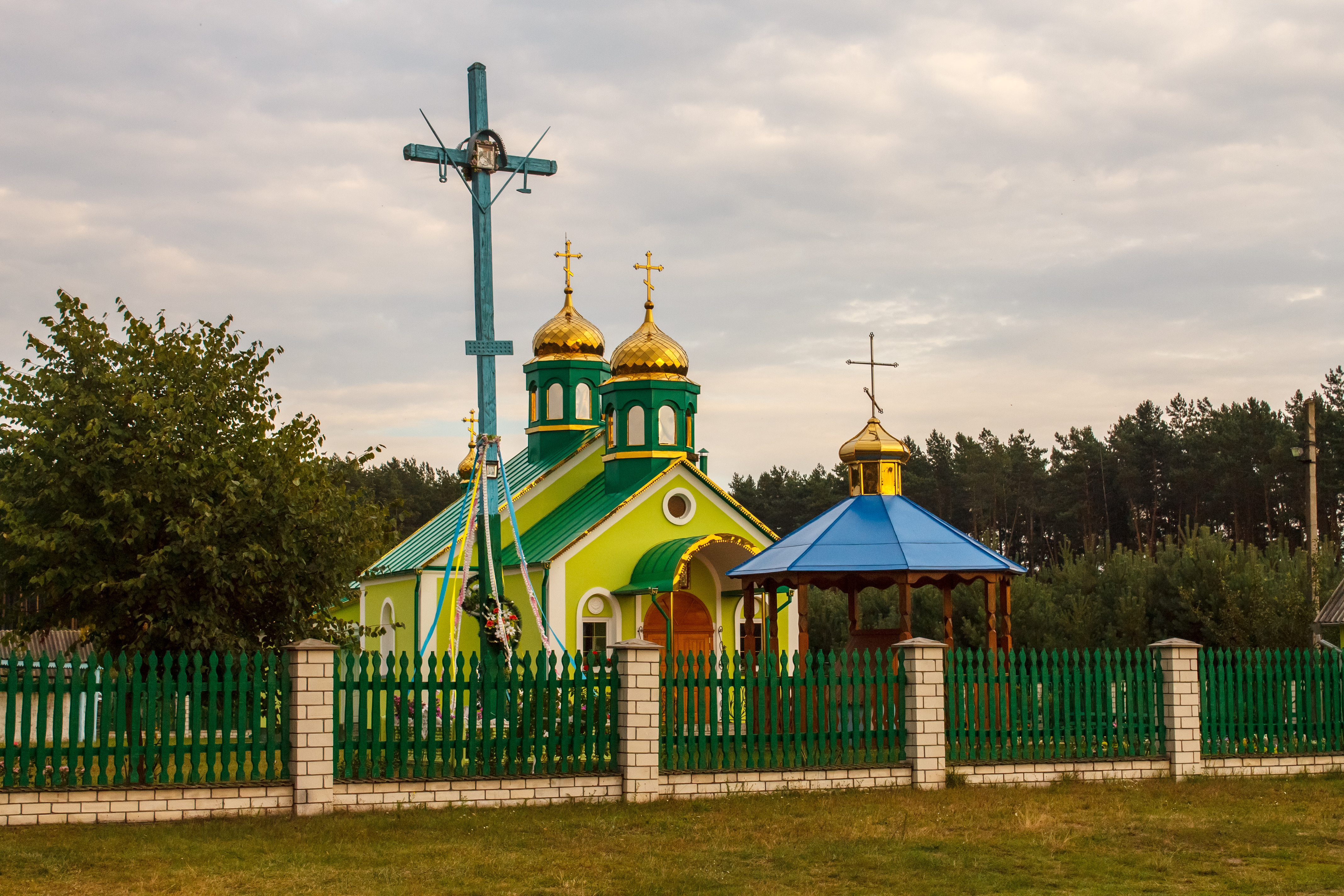 Храм в с. Стара Миколаївка Рівненської області